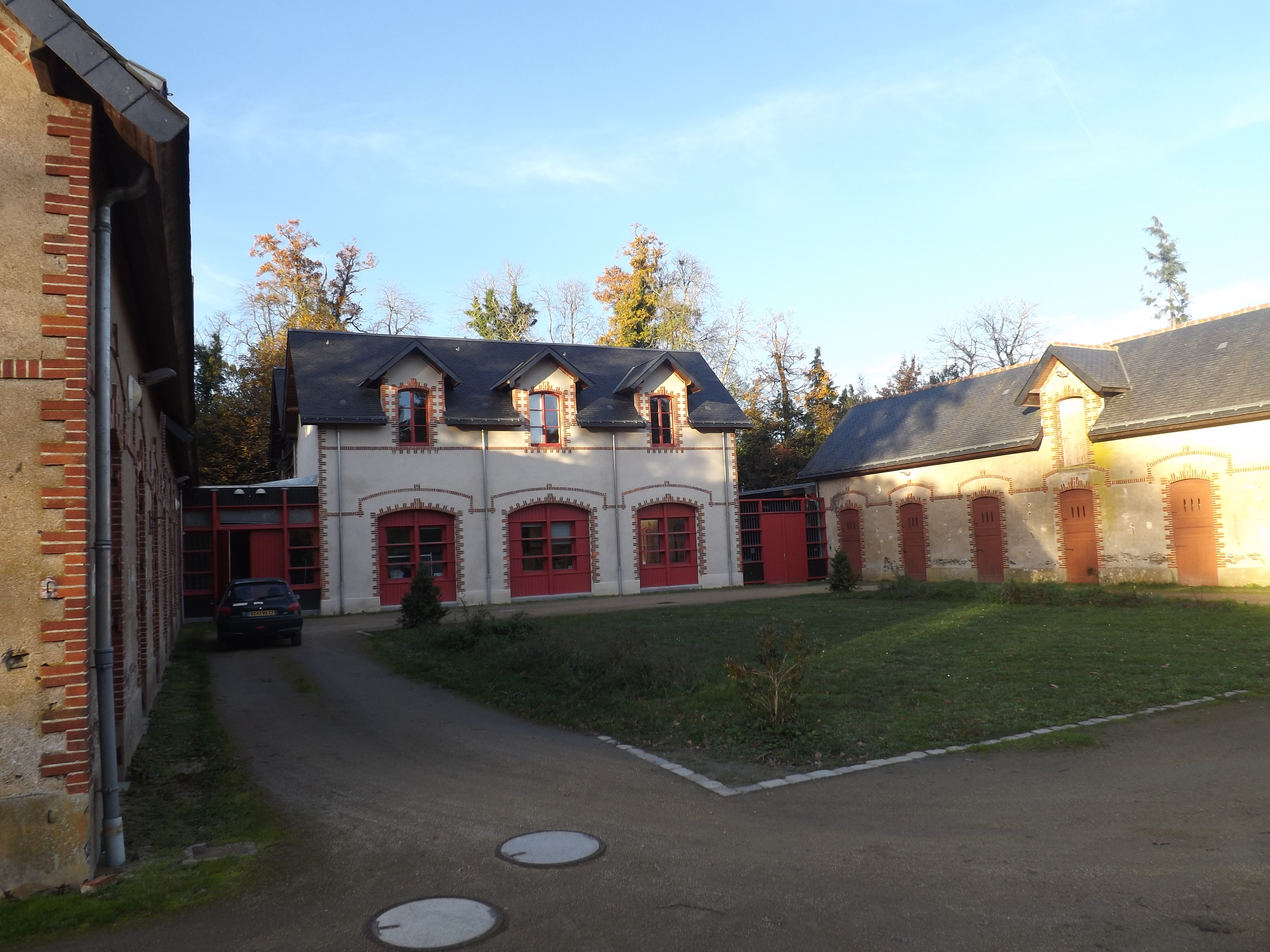 Centre vétérinaire de la faune sauvage et des écosystèmes, à l'école vétérinaire de Nantes